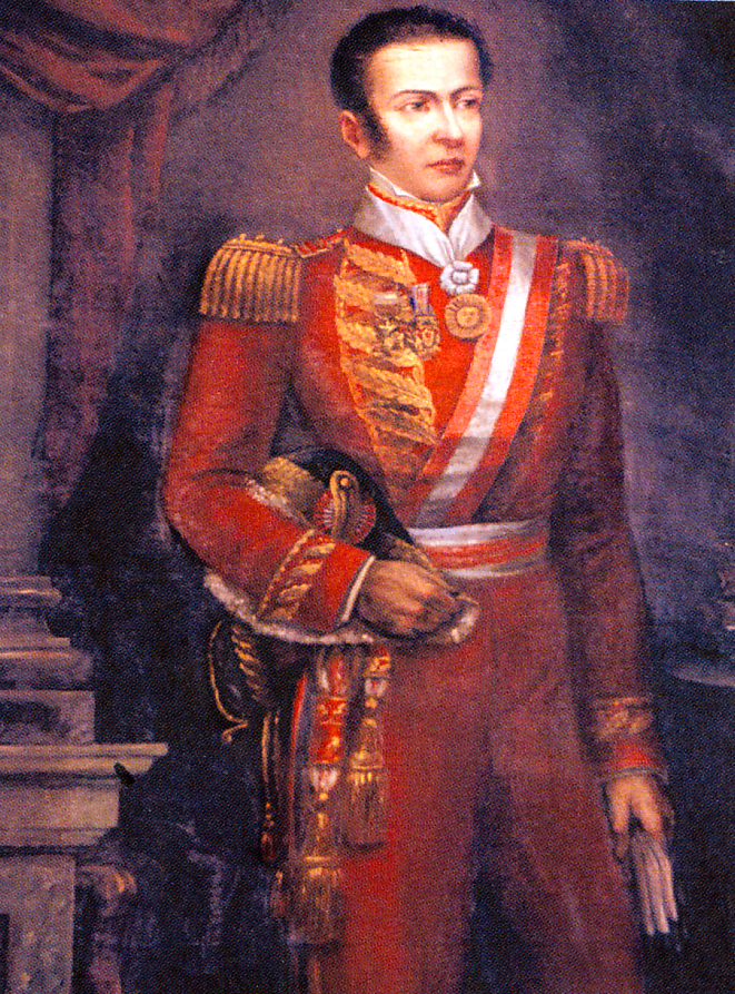 José Mariano de la Riva Agüero y Sánchez Boquete (1783 -1858), fue un militar y político peruano. Figura prócer de la independencia hispanoamericana, fue Presidente del Perú en 1823. Fue el primer Jefe de Estado peruano en llevar el título de Presidente de la República y en lucir la banda presidencial bicolor como distintivo del poder que ejercía.